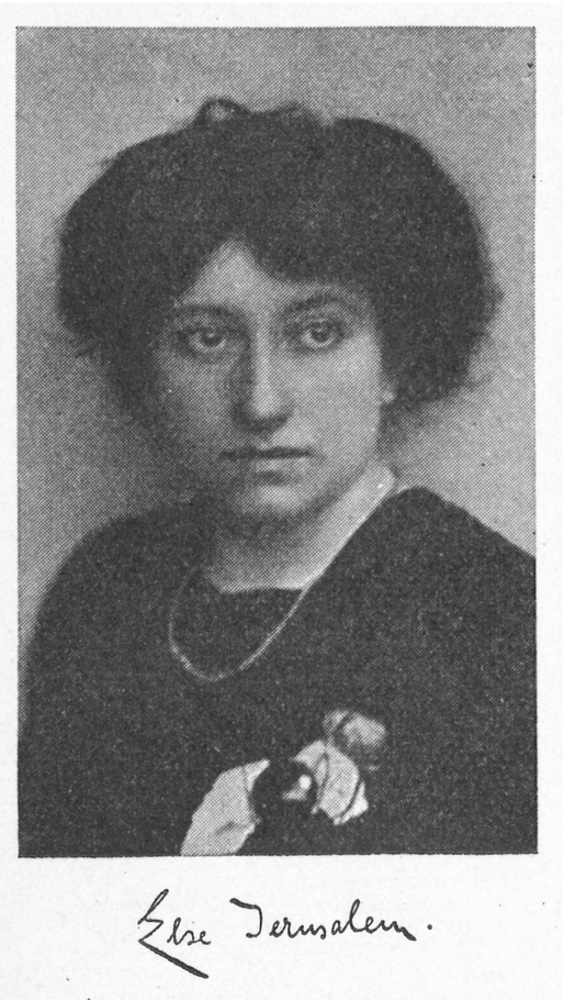 Portrait von Else Jerusalem